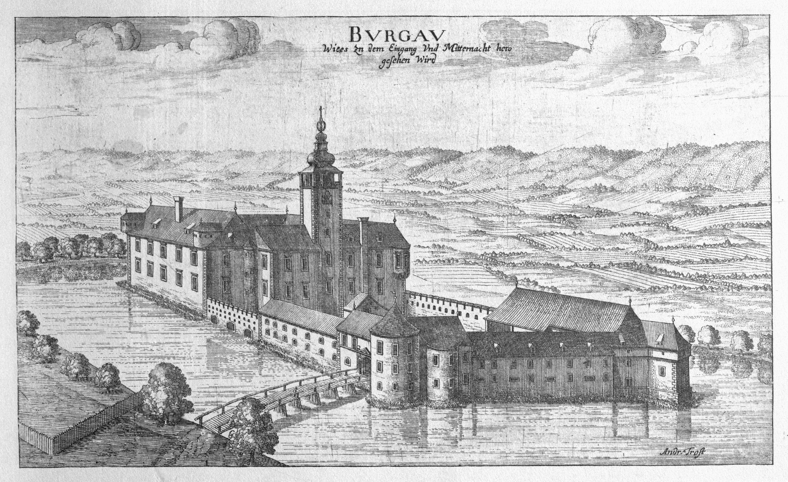 G. M. Vischers Käyserlichen Geographi, Topographia Ducatus Stiriae, Das ist: Eigentliche Delineation / und Abbildung aller Städte / Schlösser / Marcktfleck / Lustgärten / Probsteyen / Stiffter / Clöster und Kirchen / so es sich im Herzogthumb Steyrmarck befinden; Und anjetzo Umb einen billichen Preyß zu finden seynd Bey Johann Bitsch Universitäts Buchhandlern / Auff dem Juden=Platz bey der guldenen Saulen. Graz 1681 Die Nummerierung der Dateien folgt der alphabetischen Reihung der Orte